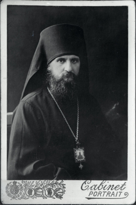 Епископ Андрей (Ухтомский) Место съемки: Ярославская губерния Место хранения: Рыбинский музей-заповедник